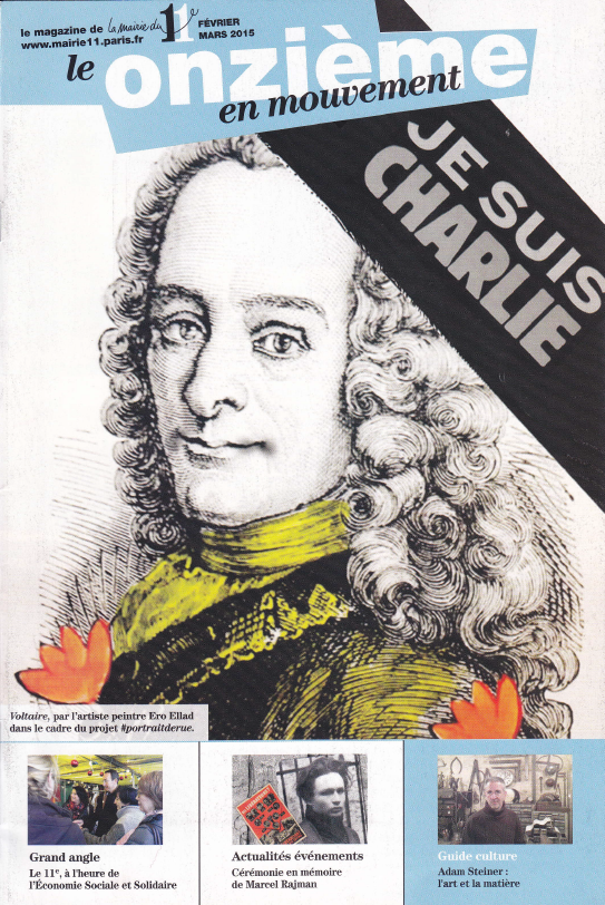 Le onzieme Voltaire-Je suis Charlie fevrier-mars 2015